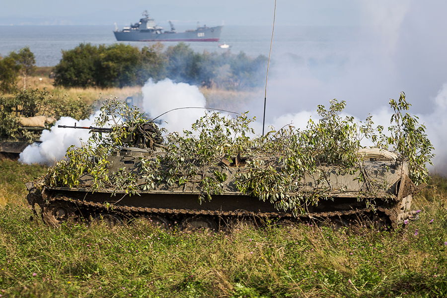 СКШУ «Восток-2014». День четвертый: действия мотострелкового подразделения в наступлении (о. Сахалин).